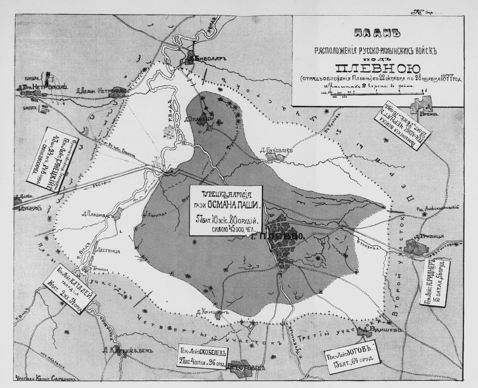 Блокада на Плевен